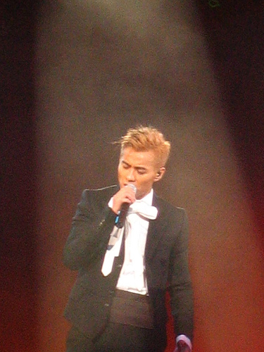 Edmond LeungEdmond Leung